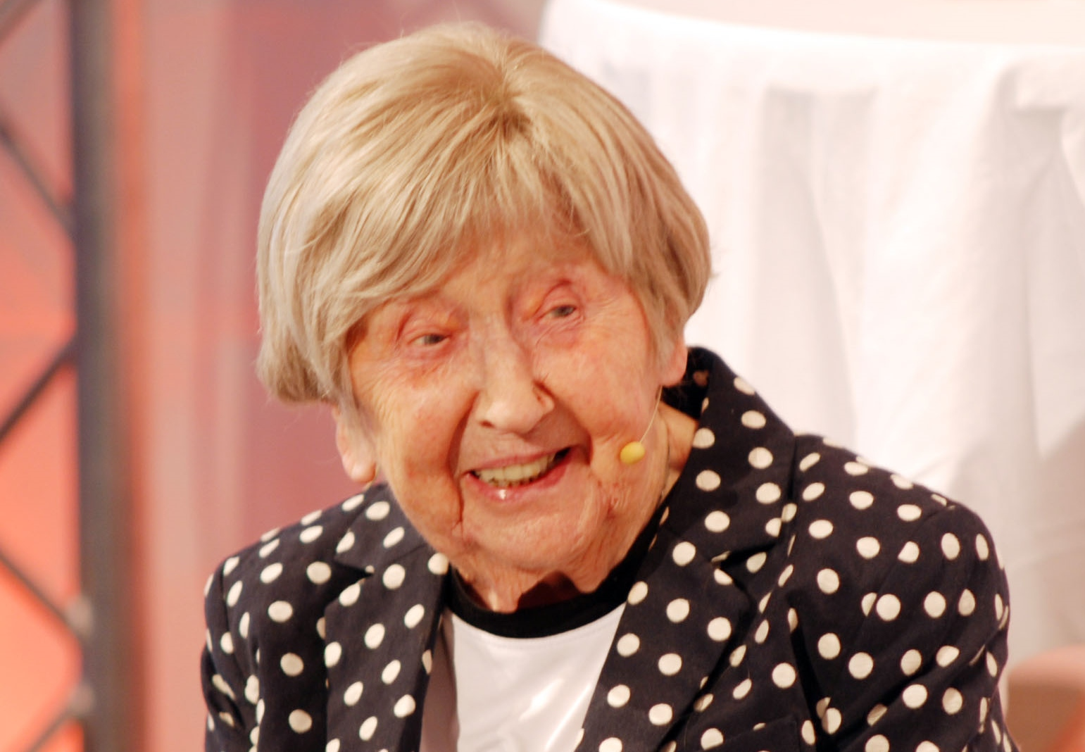 Dagny Carlsson, svensk bloggare.